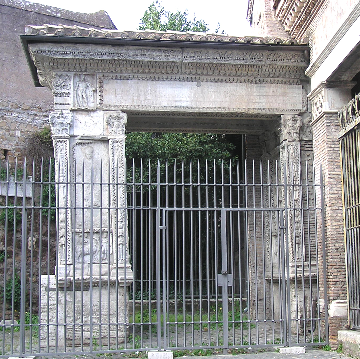 Roma, Arco degli Argentari (Foro Boario) presso la chiesa di San Giorgio in Velabro